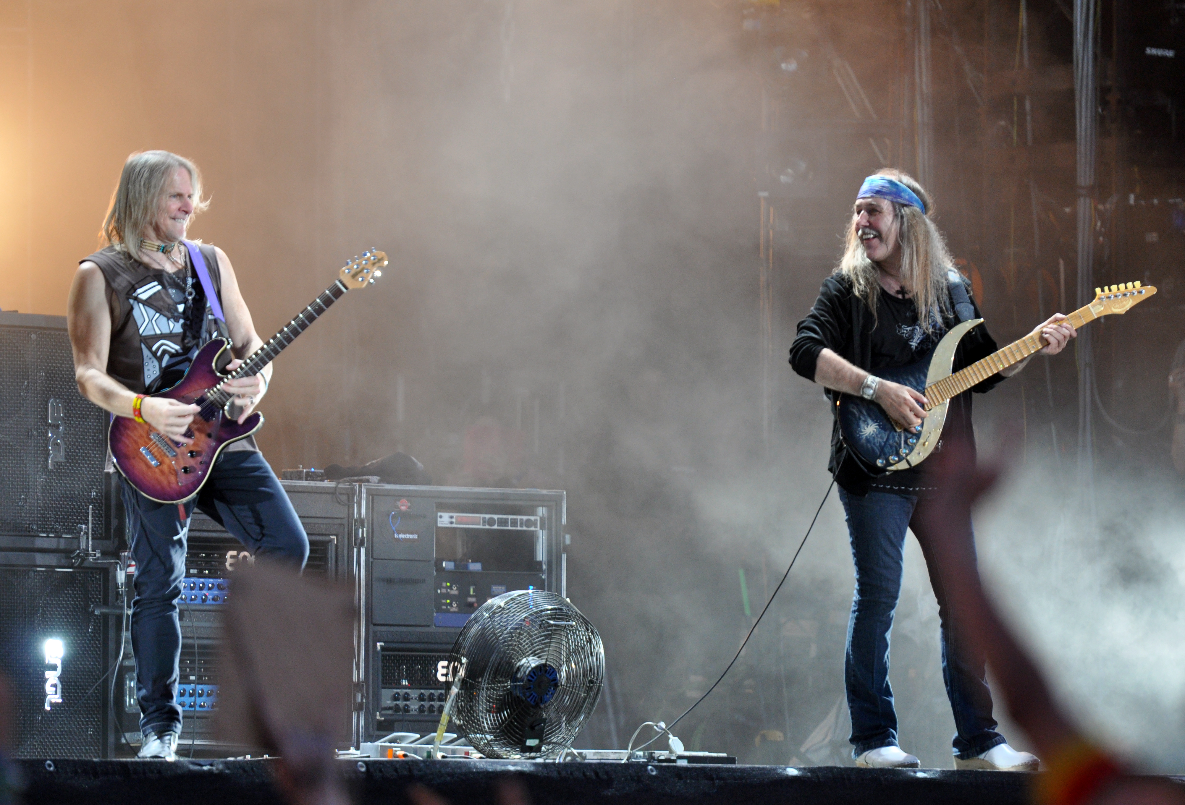 Deep Purple at Wacken Open Air 2013